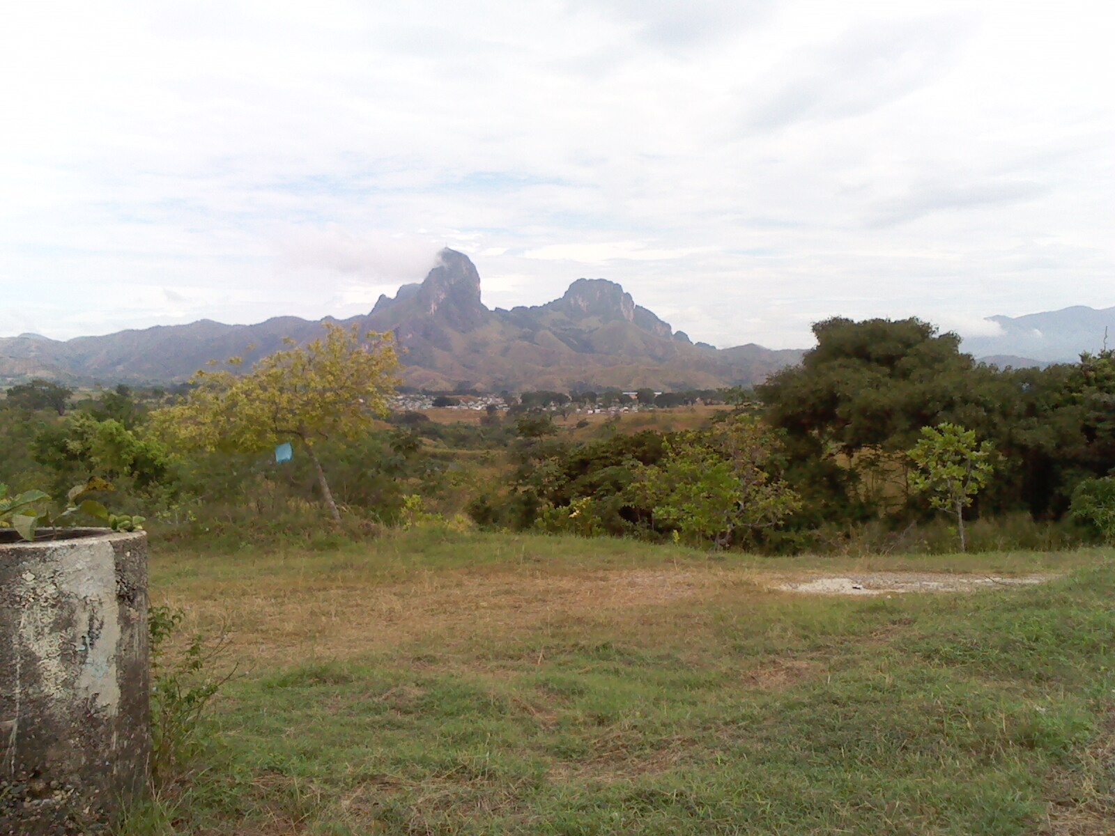 Wikiviajes por Venezuela 2014